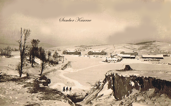 Kaserne in Sambor